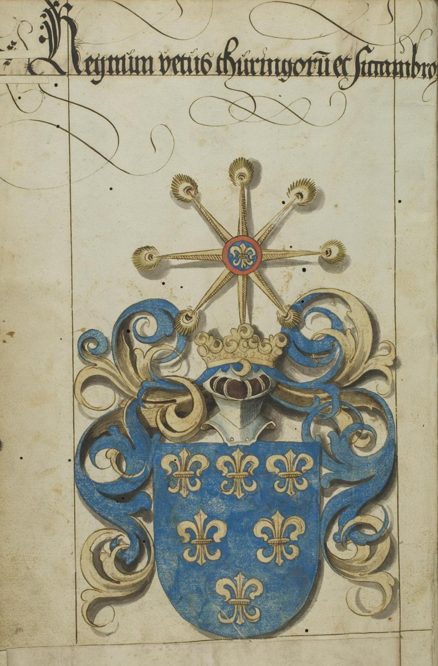 Wappen des Thüringer Königreiches